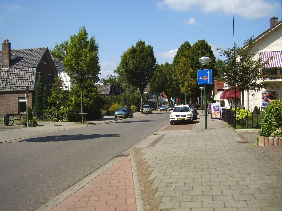 Dorpsstraat in Diepenveen, the Netherlands